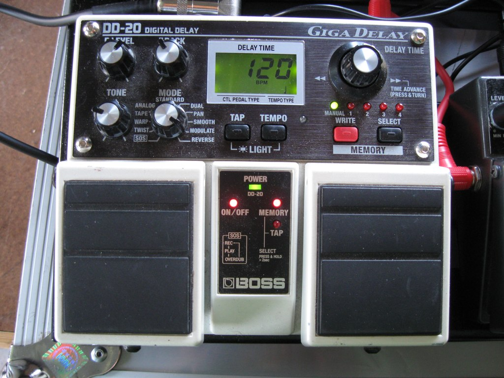 Boss DD-20 Giga Delay